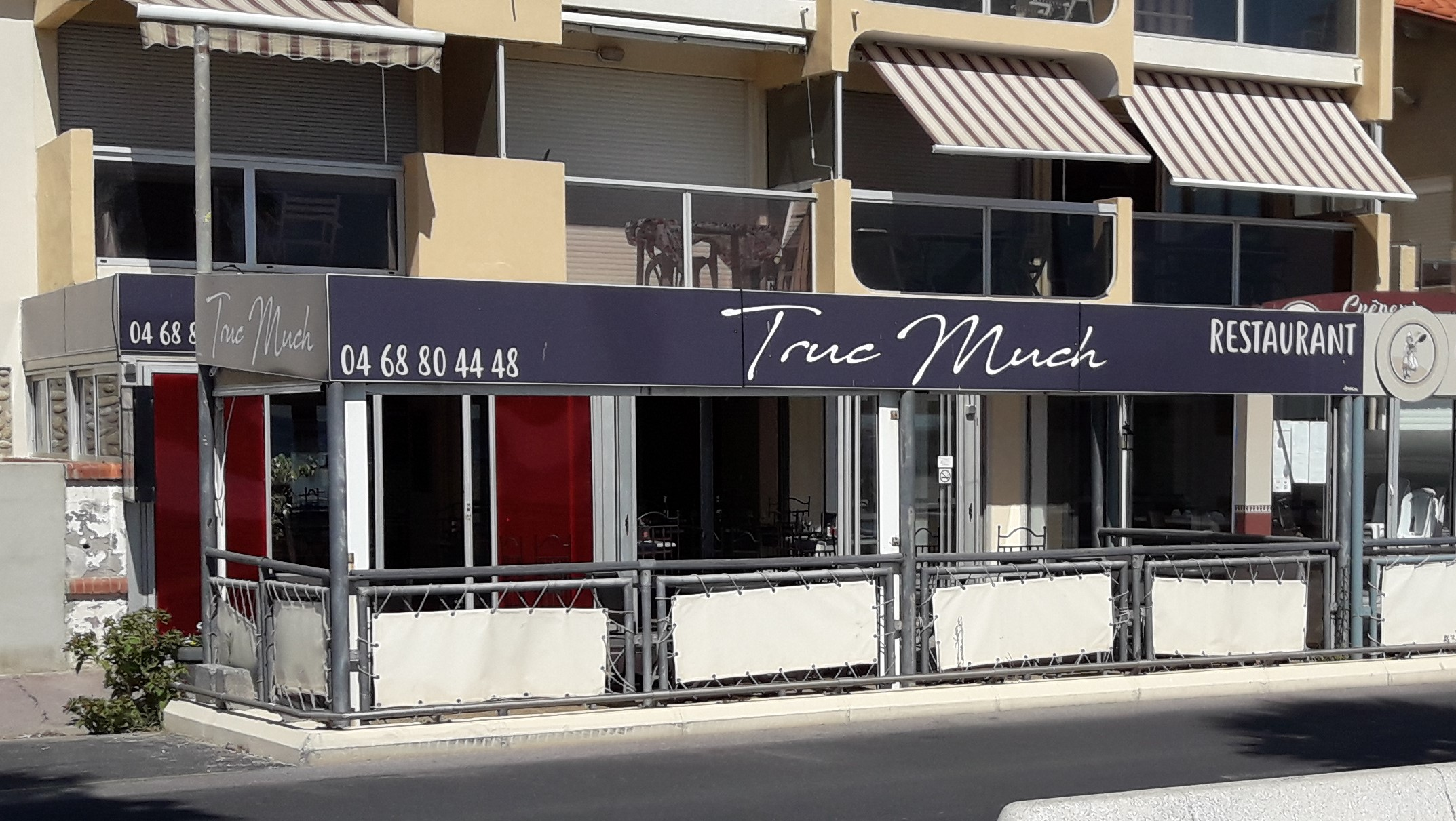 Le restaurant Truc Much à Canet-en-Roussillon en juillet 2018.